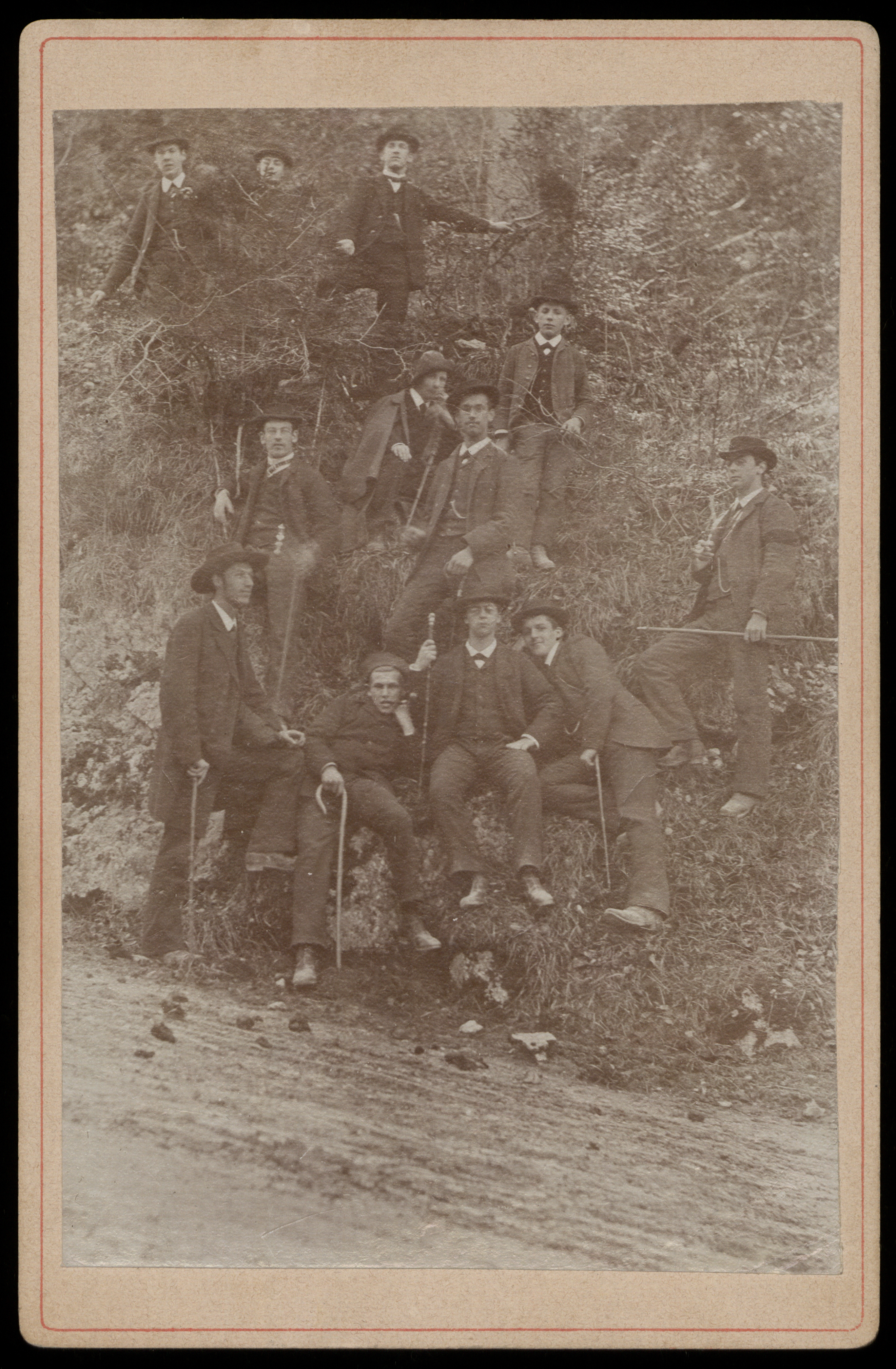 Gruppenbild, Semesterbummel der Concordia, 28. März 1893; vorne zweiter von rechts: Paul Burckhardt (1873-1956)